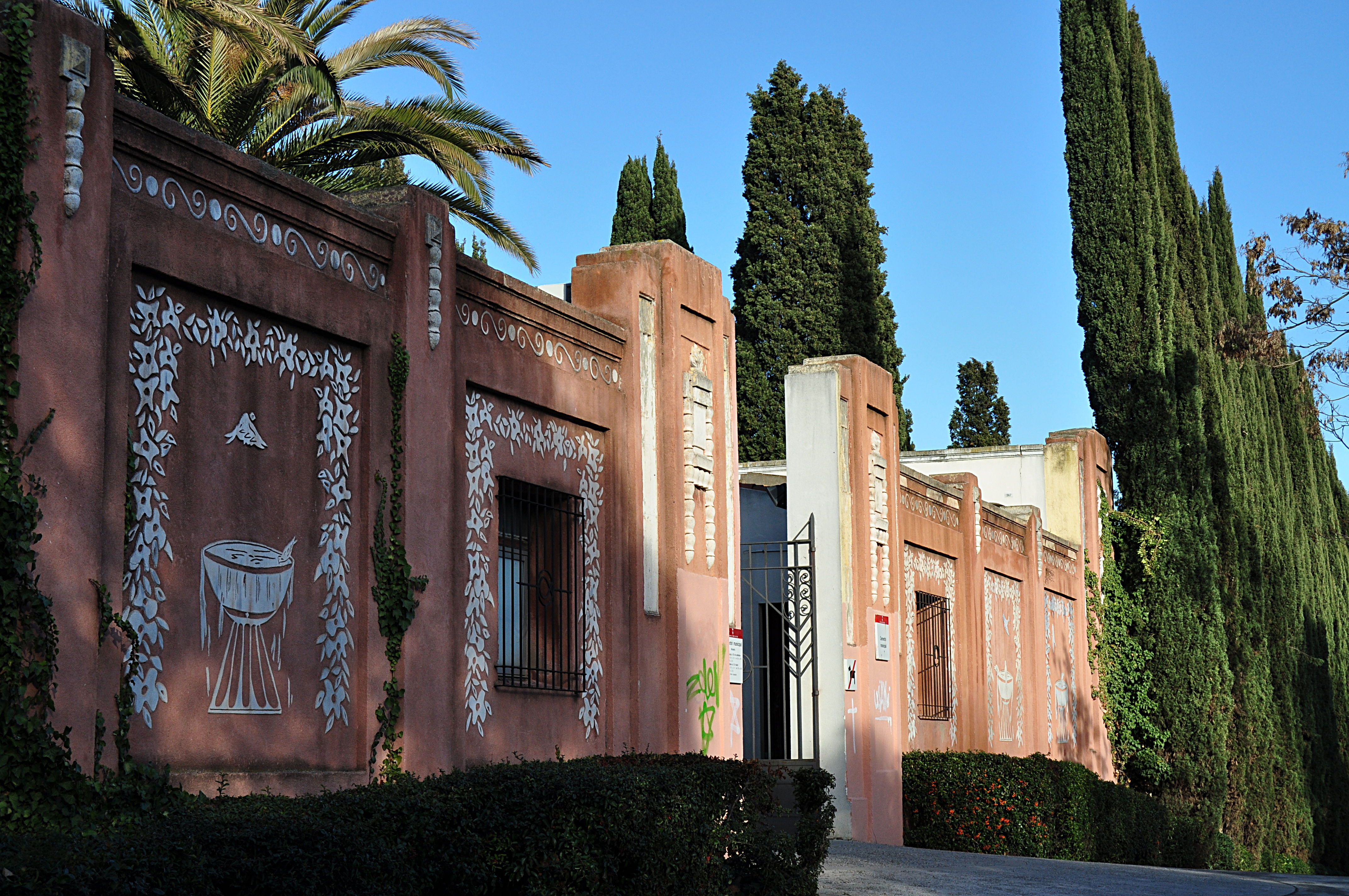 Cementiri al Parc de Plana Lledó (Mollet del Vallès, Vallès Oriental).